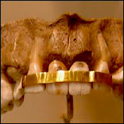 Esposta nella collezione del Museo Nazionale di Tarquinia,rappresenta una protesi dentaria eseguita con una sottile lamina d'oro.